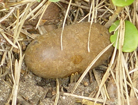 Lasiocampa quercus (Lasiocampidae, Lepidoptera)